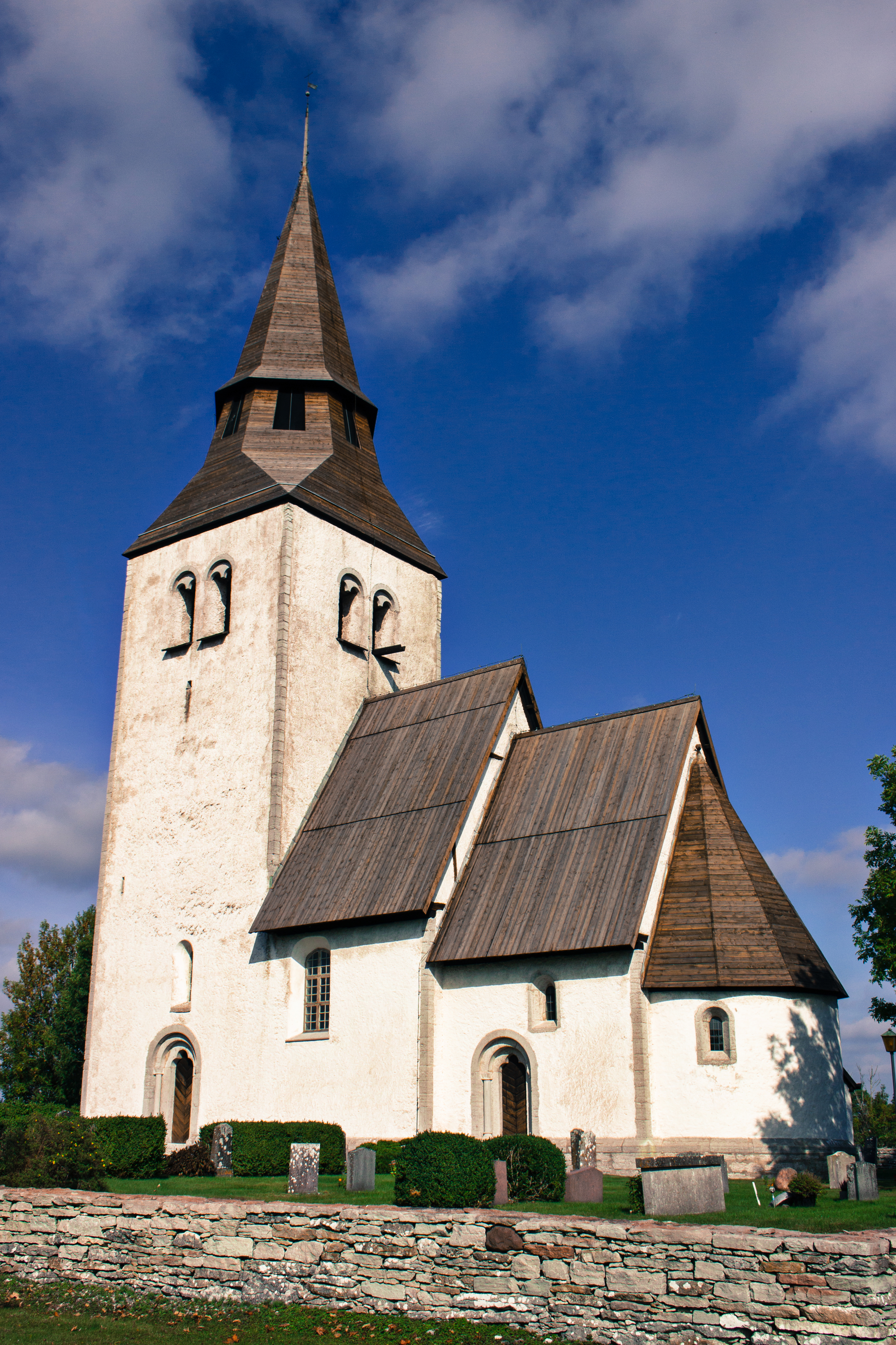 Igrexa de Anga, na illa sueca de Gotland.